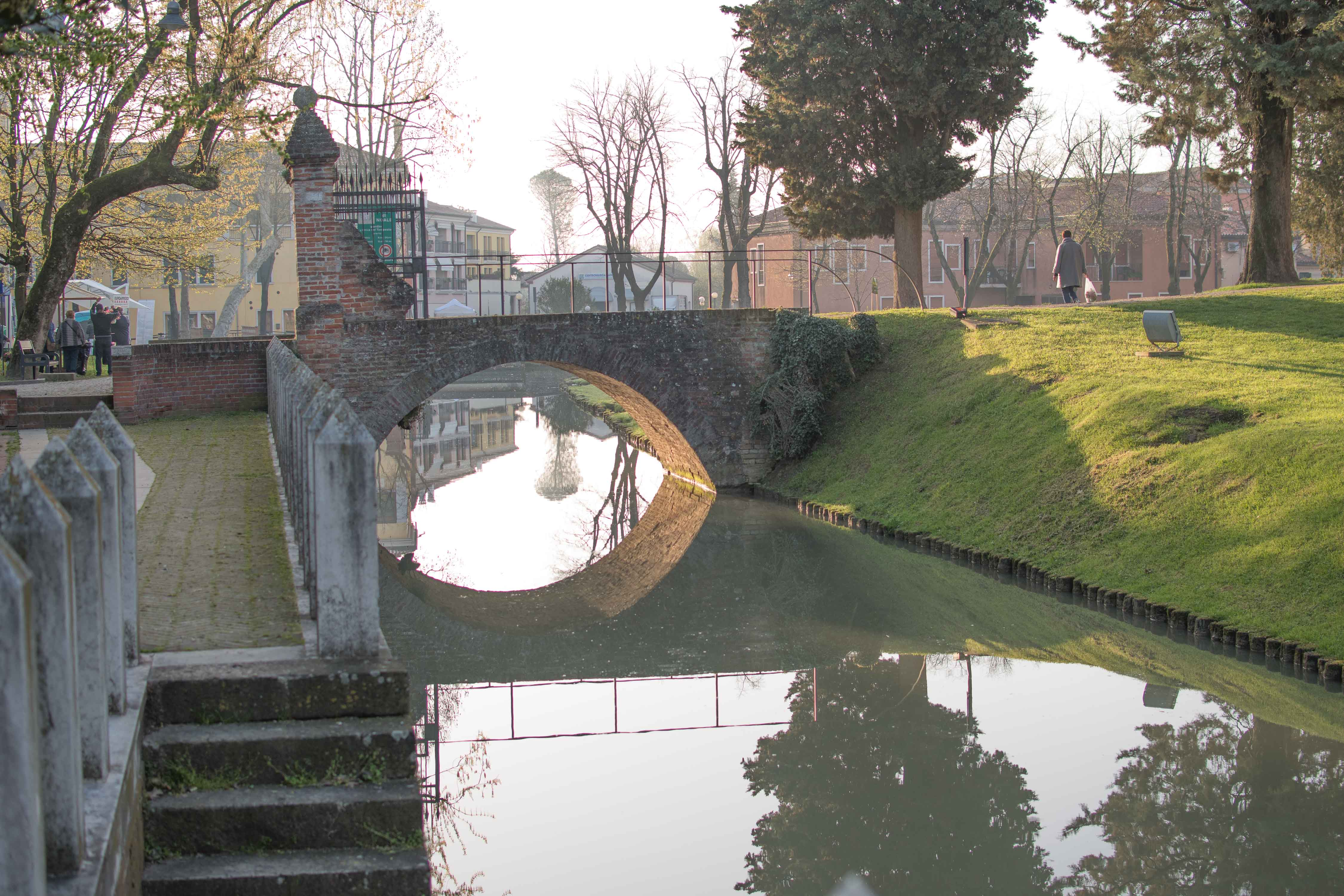 Rocca dei Tempesta This is a photo of a monument which is part of cultural heritage of Italy.